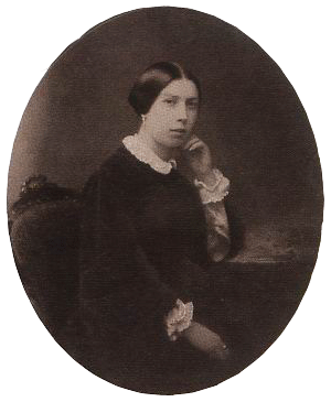 Анна Григорьевна Басаргина-Врубель (1836 - 1859)